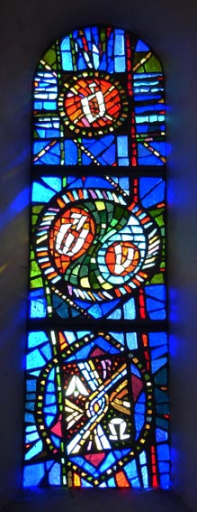 RYLSKY (1901-1970), vitrail "l'eau", vers 1962-63, église Saint-Etienne d'Angervilliers (Essonne, France)